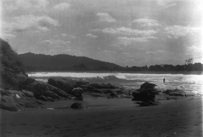 Foto. Pantai di Teluk Watuulo, Kabupaten Jember, Jawa Timur